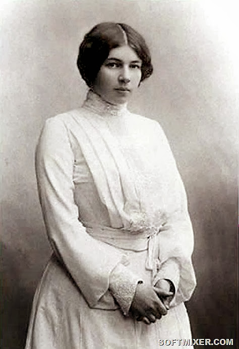 Lubov Blok